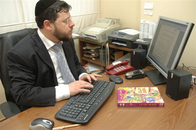 חיים ולדר במשרדו